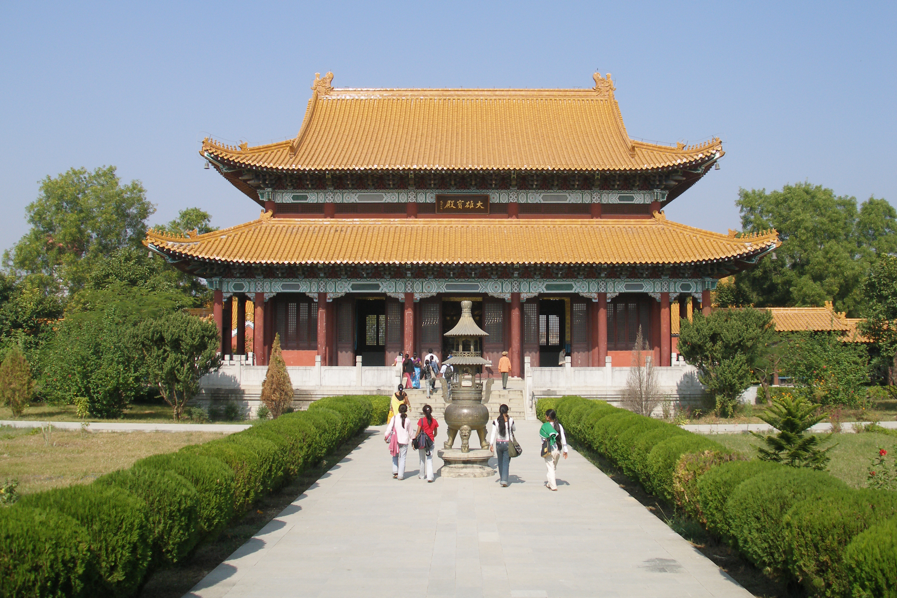 Lumbini